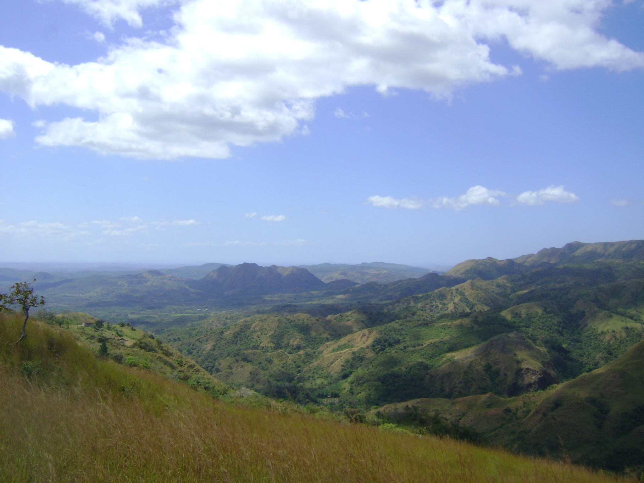 Llanura en La Yeguada, Veraguas